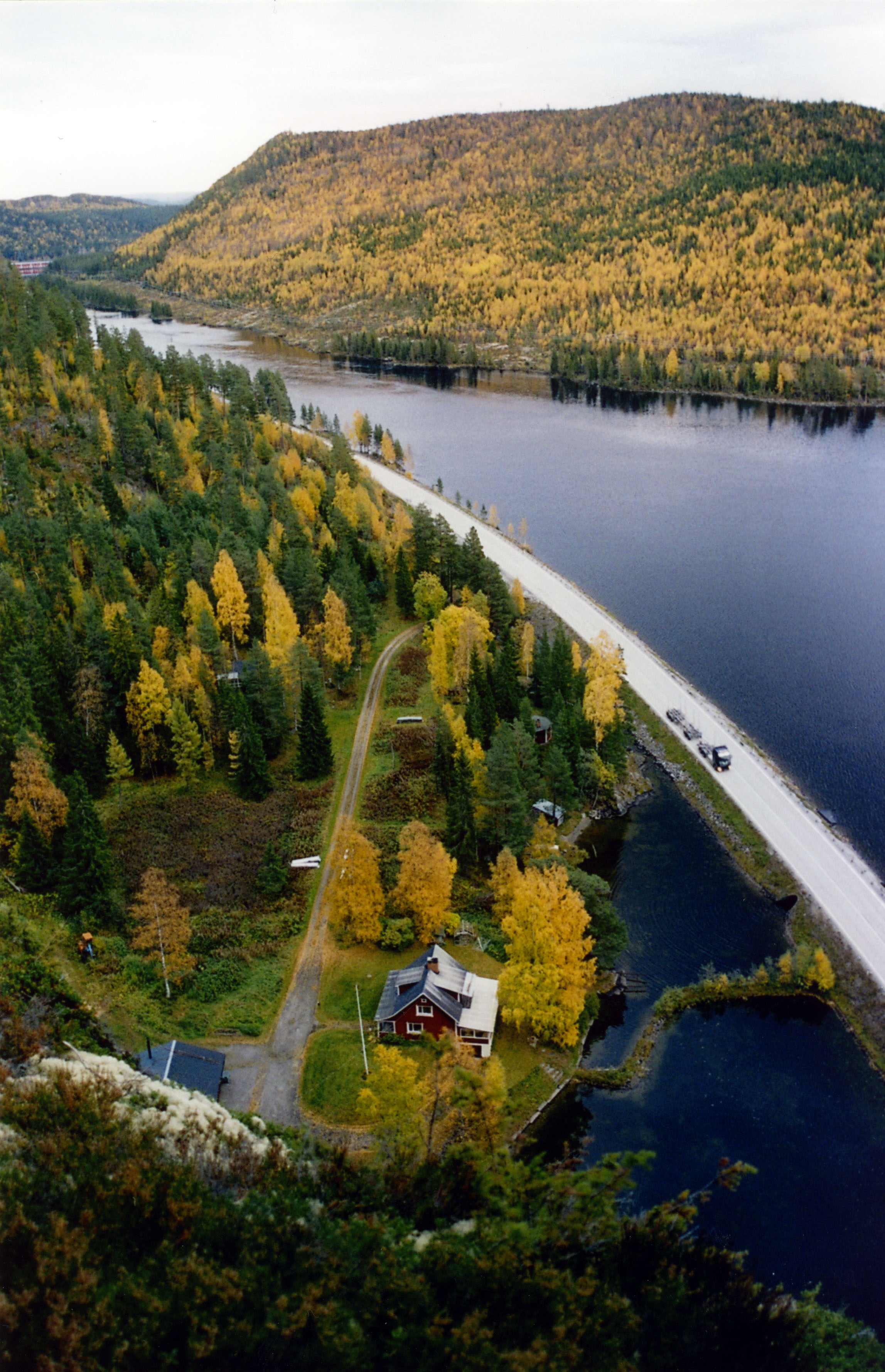 Stadsberget och indalsälven strax ovanför Krångede kraftverk i Jämtland.